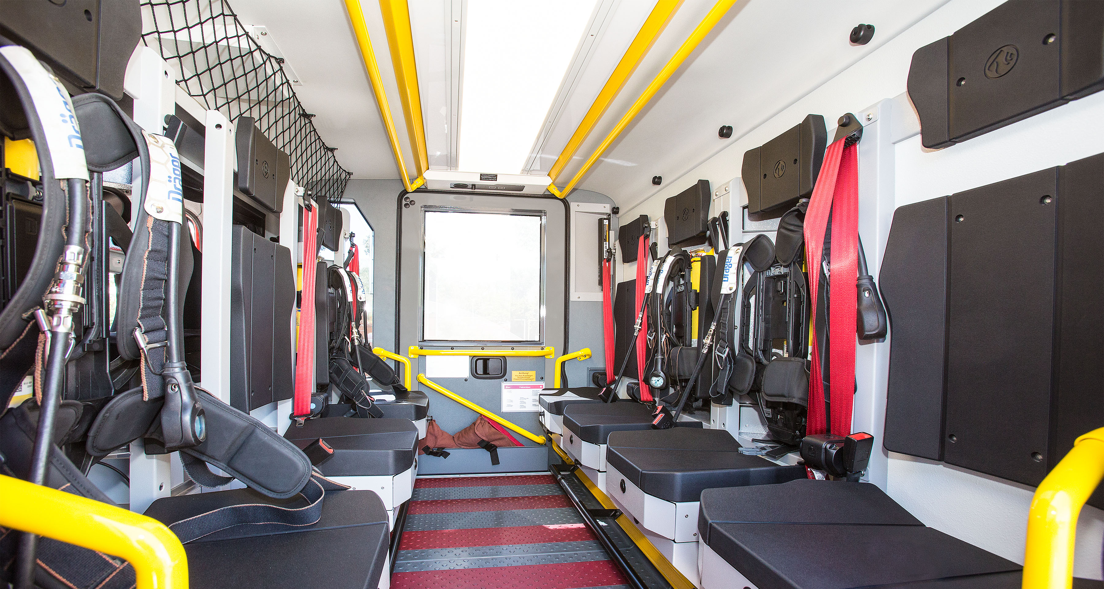 Mannschaftskabine Z-Cab